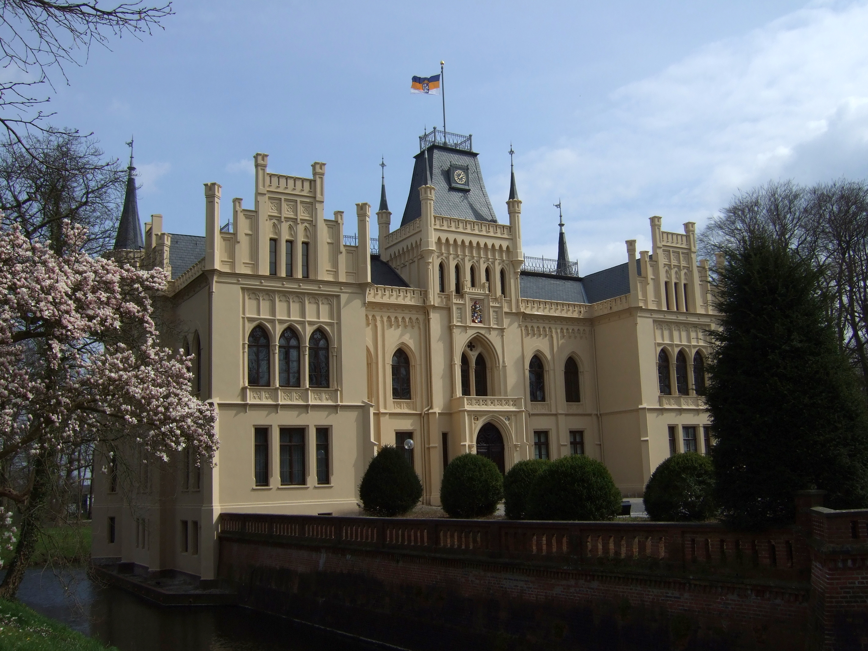 Die Evenburg in Leer, Ostfriesland, Stadtteil Loga nach der Renovierung im neugotischen Stil.